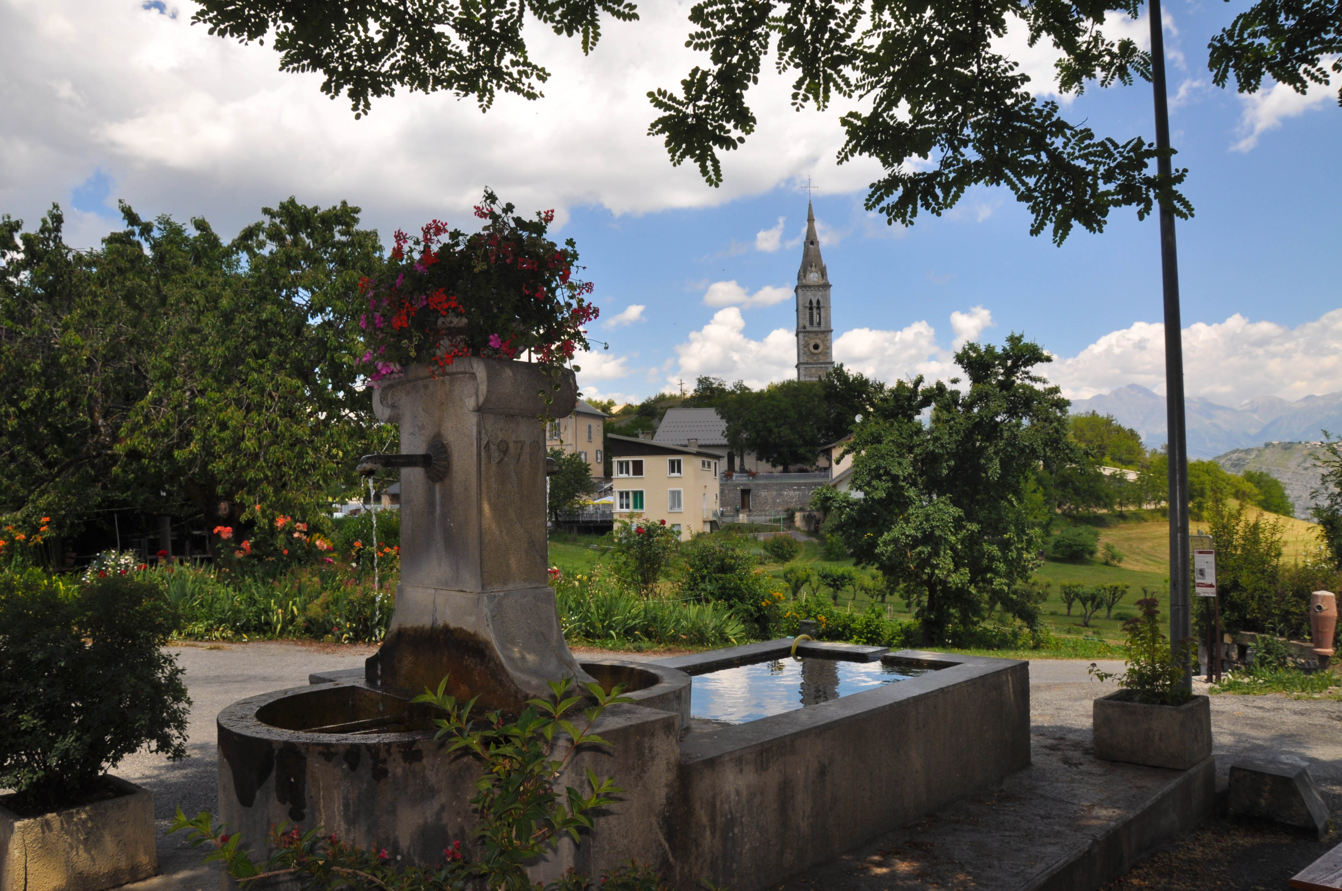 Lavoir-fontaine et village